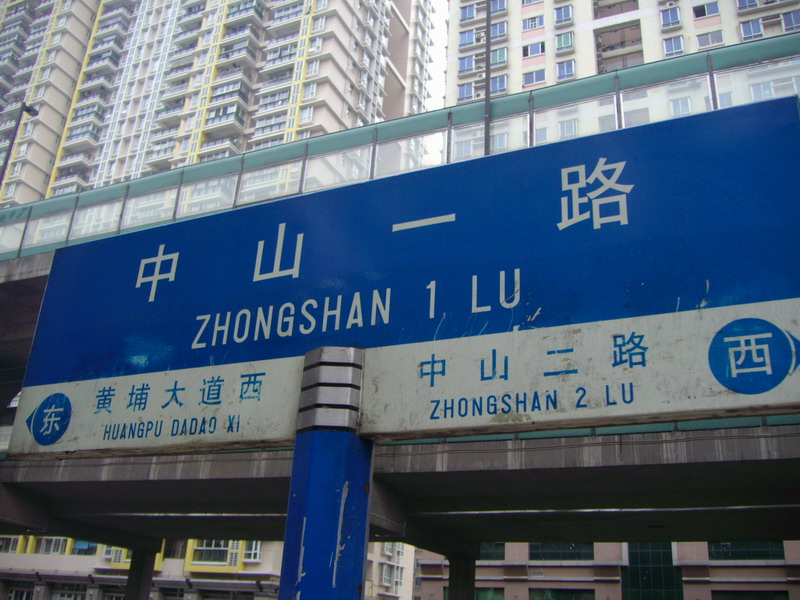 广州中山一路路牌